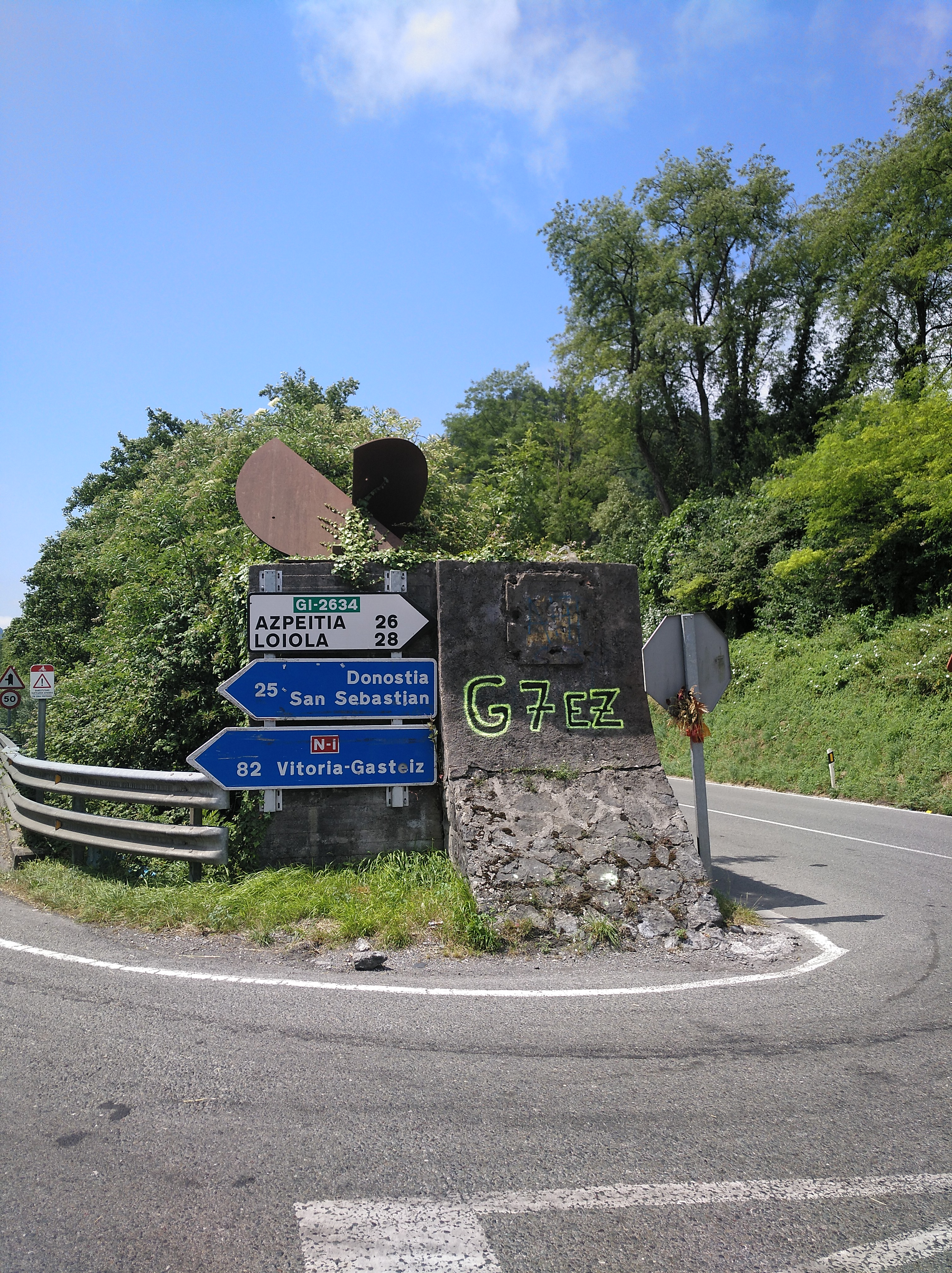 Benta Haundi, Tolosa, Gipuzkoa